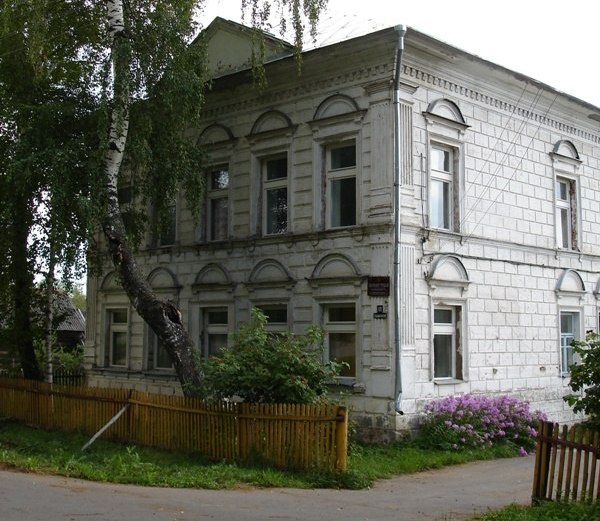 Архитектурный памятник в селе Толбухино